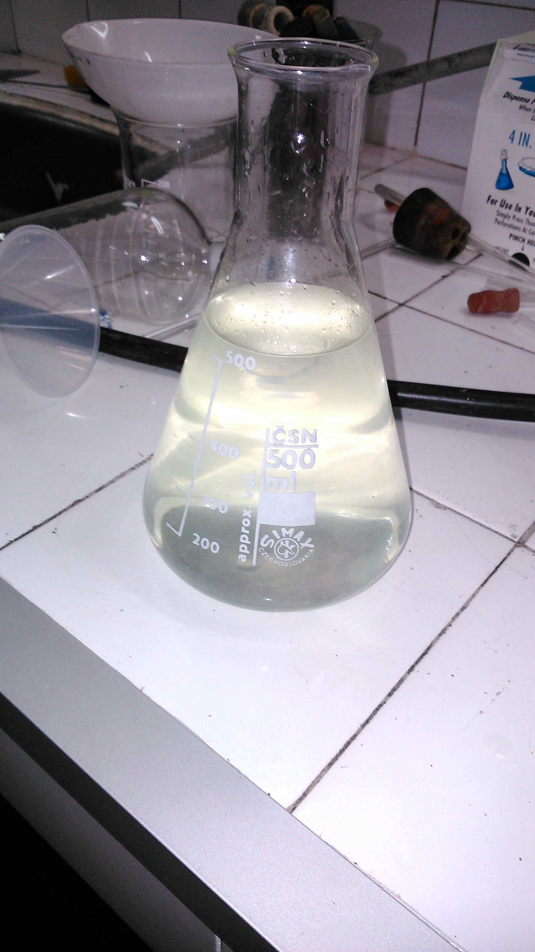 Matraz Erlenmeyer de boca ancha